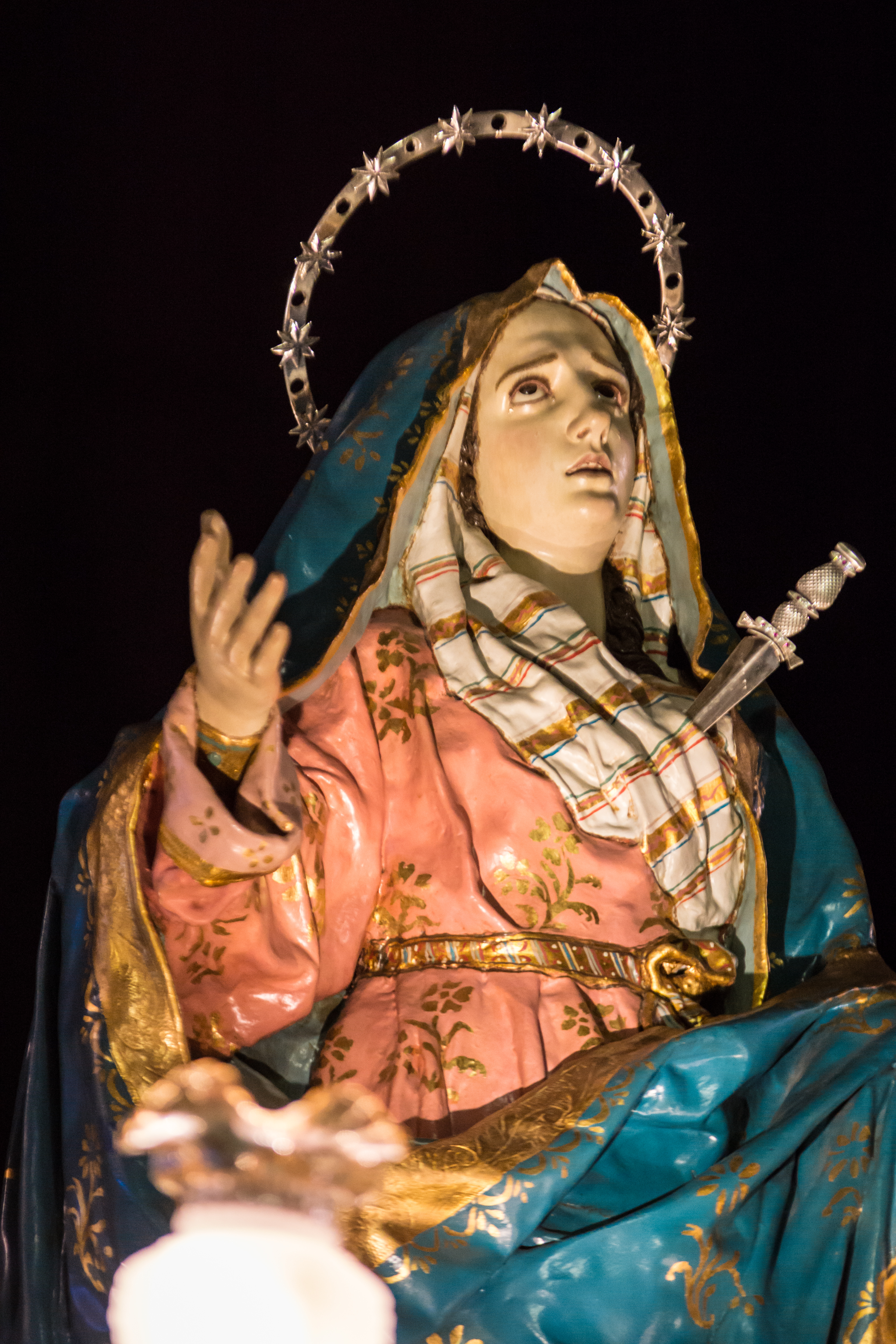 Cofradia del Amparo Murcia - Maria Santisima de los Dolores This is a photography of a Folklore festival in Spain (Wikidata id Q5685566).